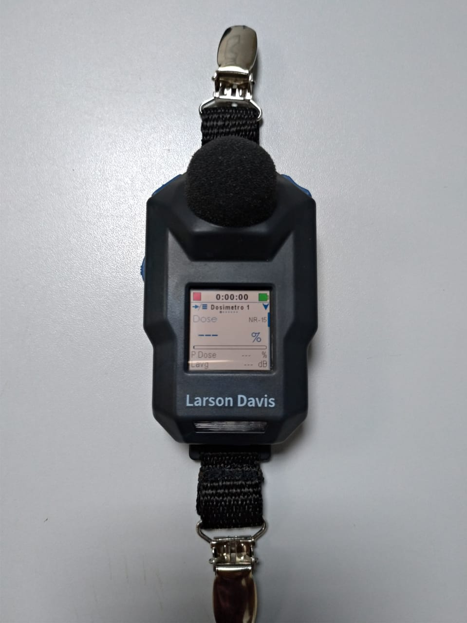 Novo dosímetro da Larson Davis: o mais robusto, inovador e mais completo do mercado, fabricado conforme as normas ANSI e IEC. Atende plenamente os requisitos de calibração dos laboratórios RBC. Primeiro dosímetro 100% wireless do mercado: operação, transferência de arquivos e carregamento da bateria.